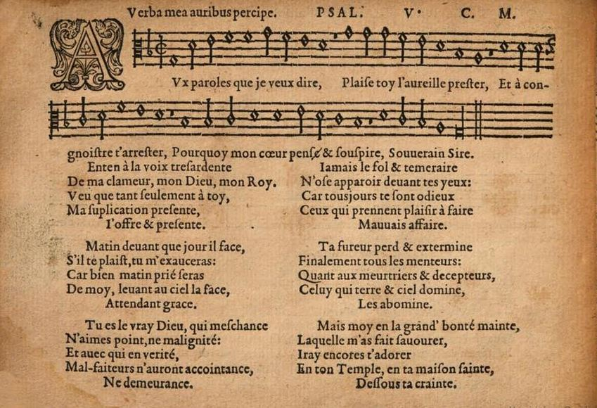 A page of Goudimel homophonic psalms (1564 version, Paris), Le Roy & Ballard)